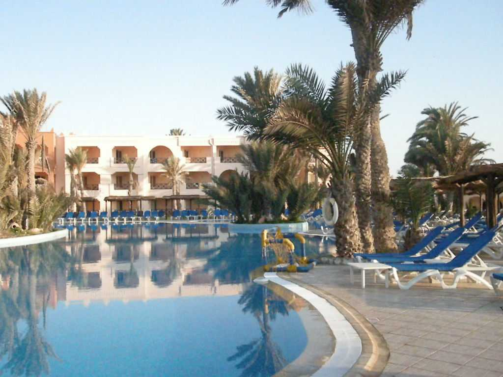 Iberostar Safira Palms